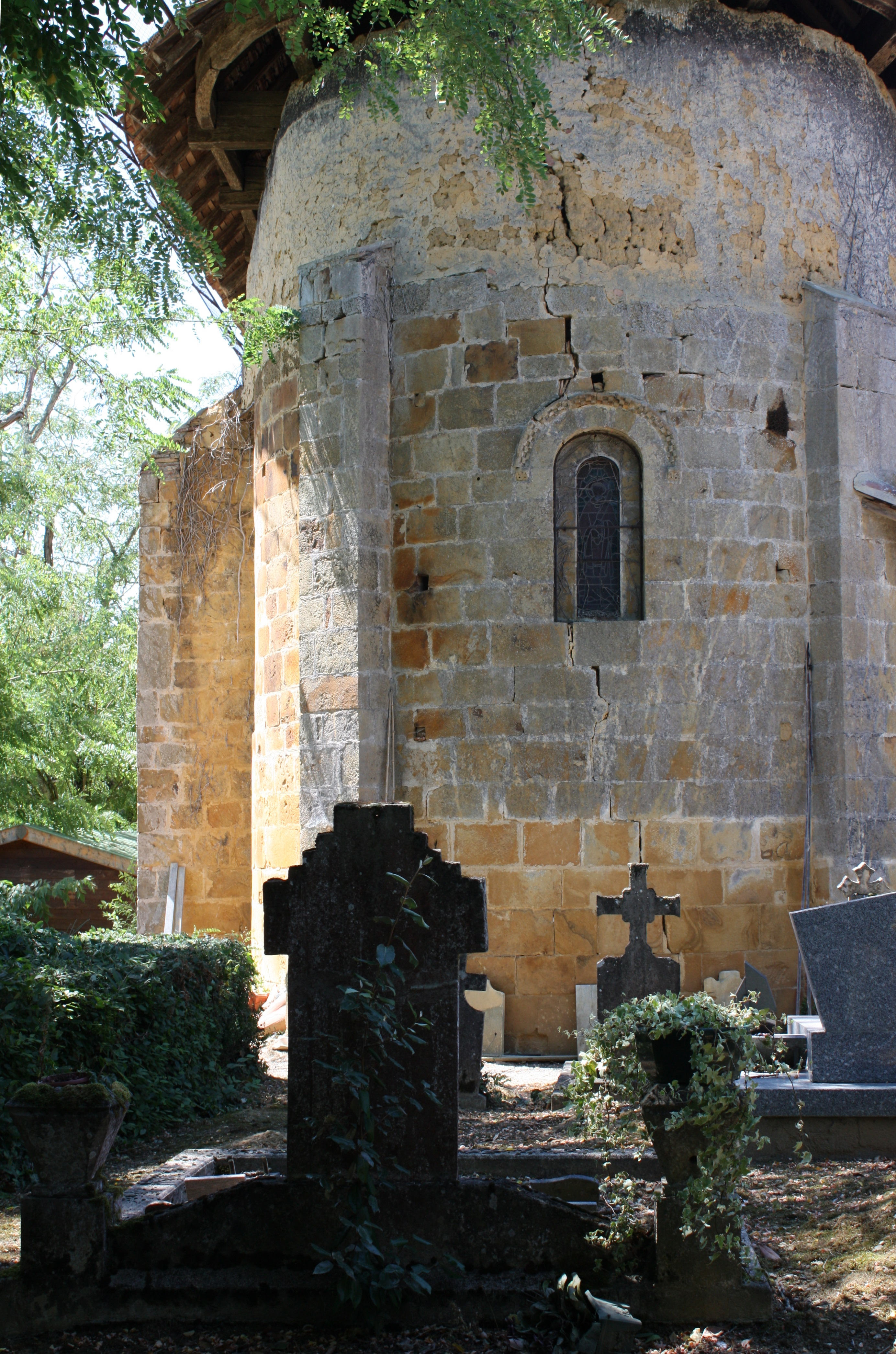 Cravencères - Eglise Saint-Vincent Abside romane